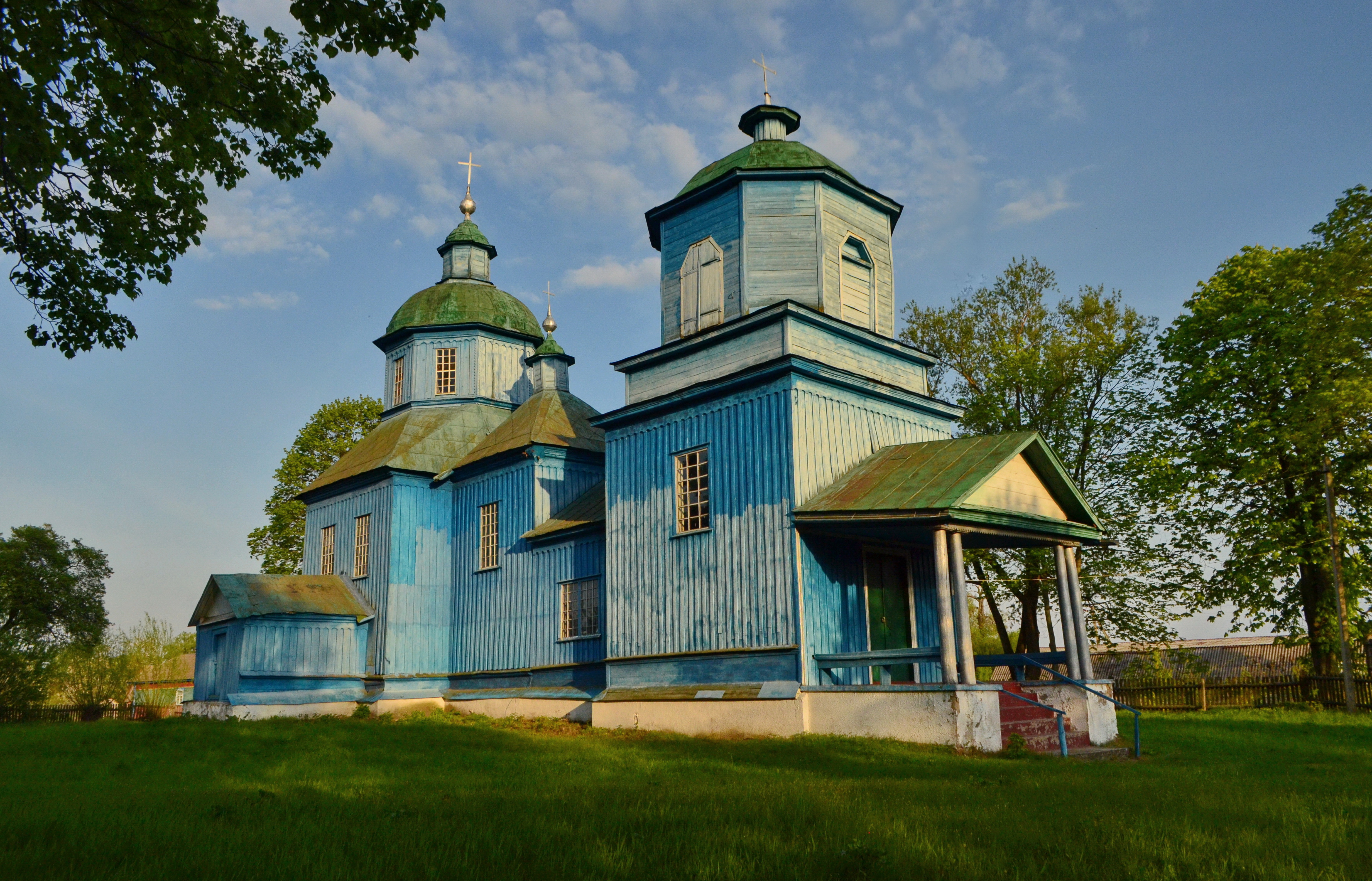 с. Степанівка. Троїцька церква. 1763 р. Довершений народний храм стоїть на давньорускому городищі.